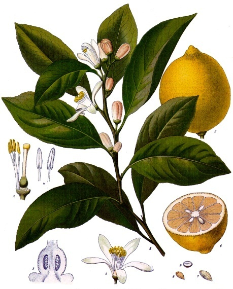 Zitrone. A blühender Zweig, natürl. Grösse; 1 Blüthe, wenig vergrössert; 2 Stempel mit Staubgefässbündel, vergrössert; 3 Fruchtknoten im Längsschnitt, desgl.; 4 Staubgefässe, desgl.; 5 Frucht, natürl. Grösse; 6 dieselbe im Querschnitt, desgl.; 7 Samenkern, desgl.; 8 derselbe im Längsschnitt, desgl.; 9 derselbe im Querschnitt, desgl.